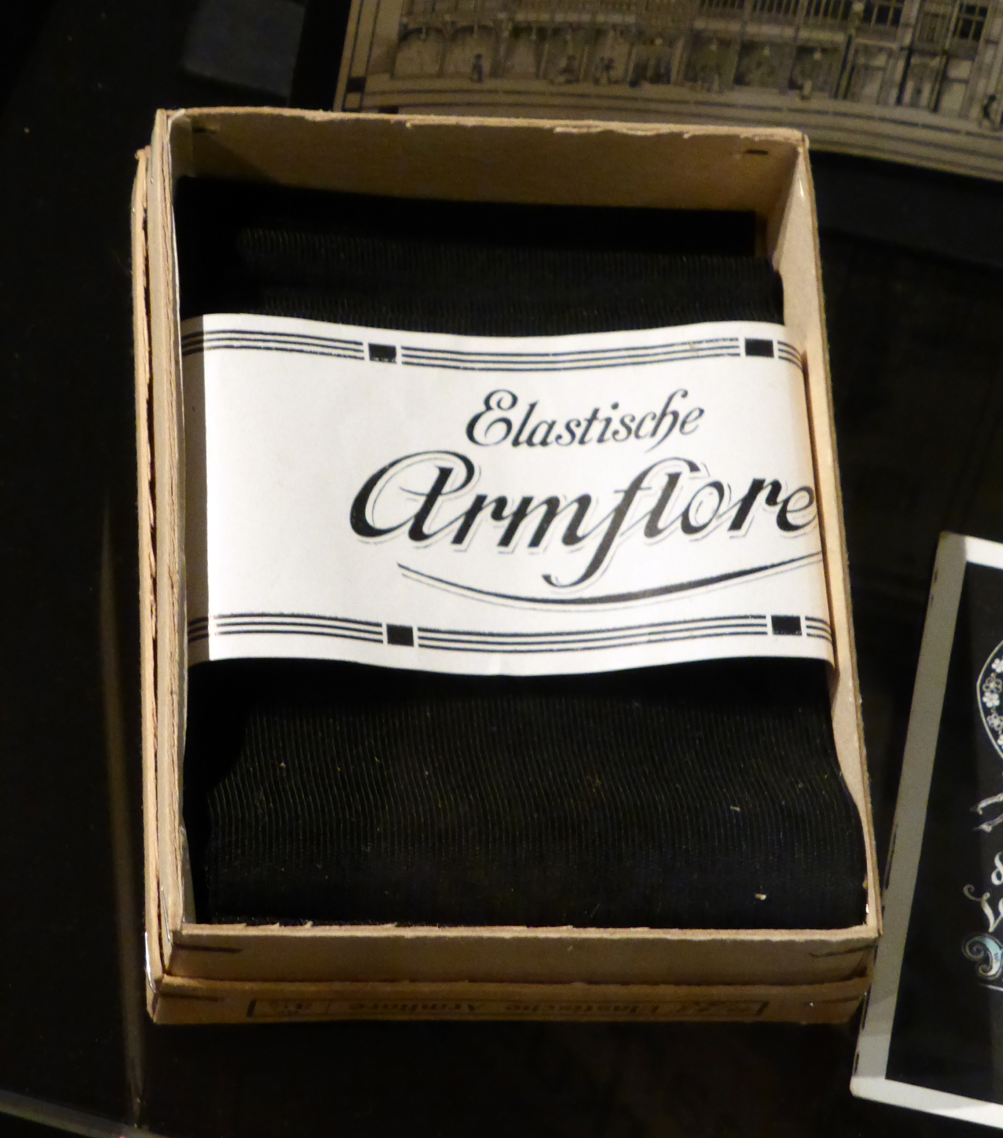 Trauerflor - elastischer Armflor (Armbinde) im Textilmuseum Cromford in Ratingen.